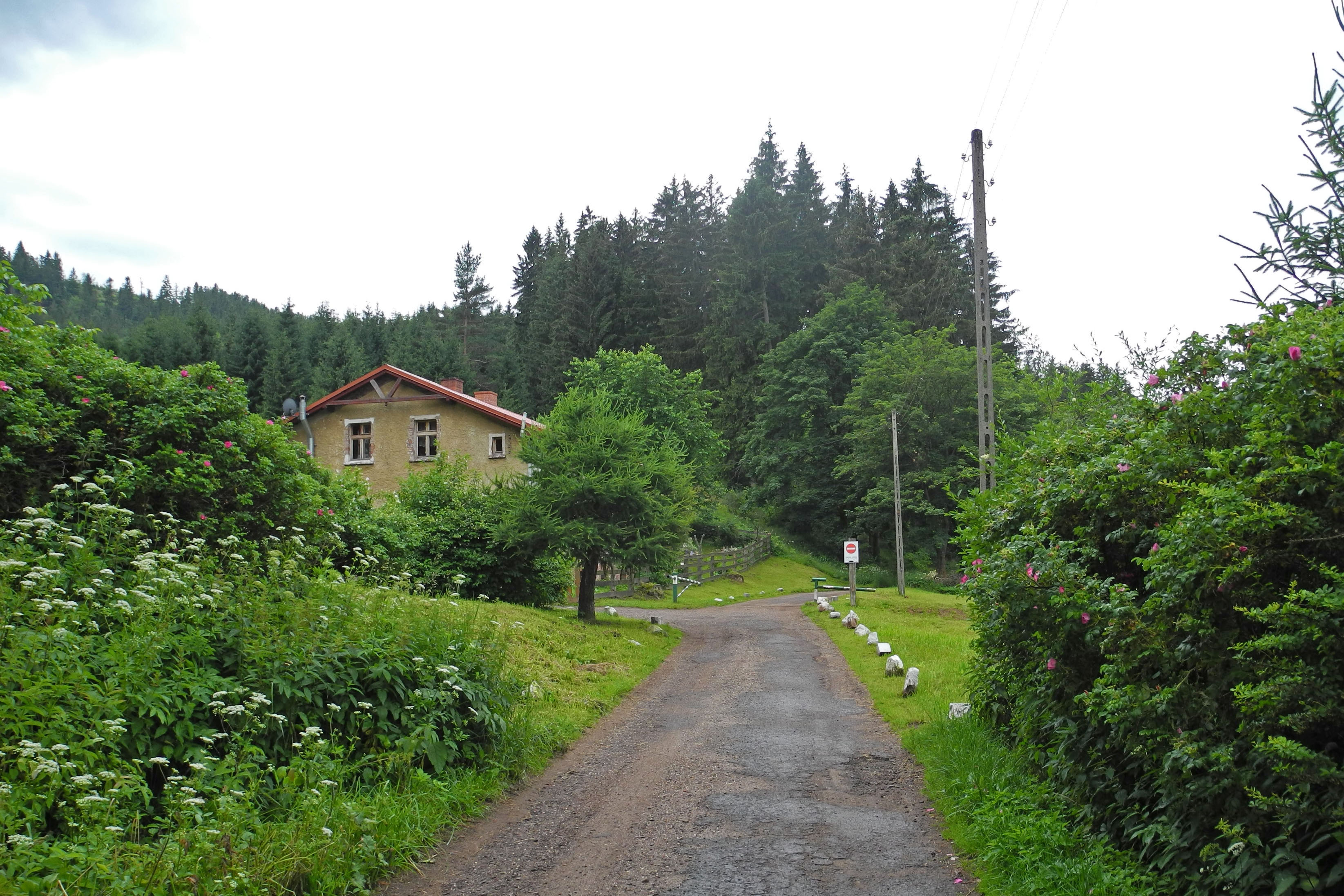 Häuser in Radosno (Freudenberg), OT von Łomnica, Gmina Głuszyca in Niederschlesien